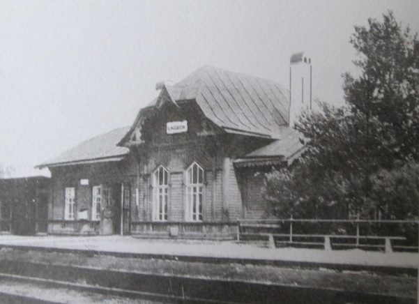 Lagedi vana jaamahoone: pildistatud tõenäoliselt 1930ndatel, autor teadmata. Jaamahoone lammutati 1998. aasta kevadel. 1990. aastate teisel poolel tegutses jaamahoones pood.